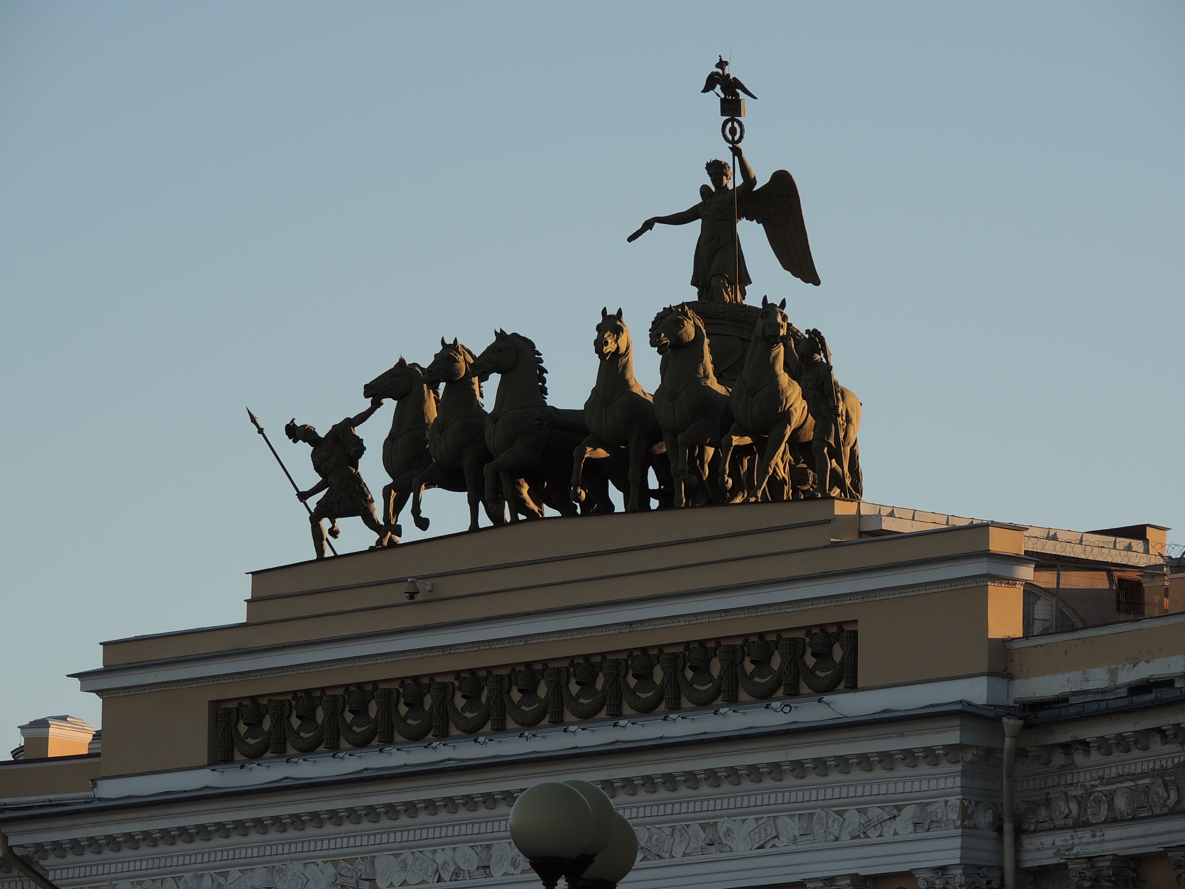 goddess Nikа 1828